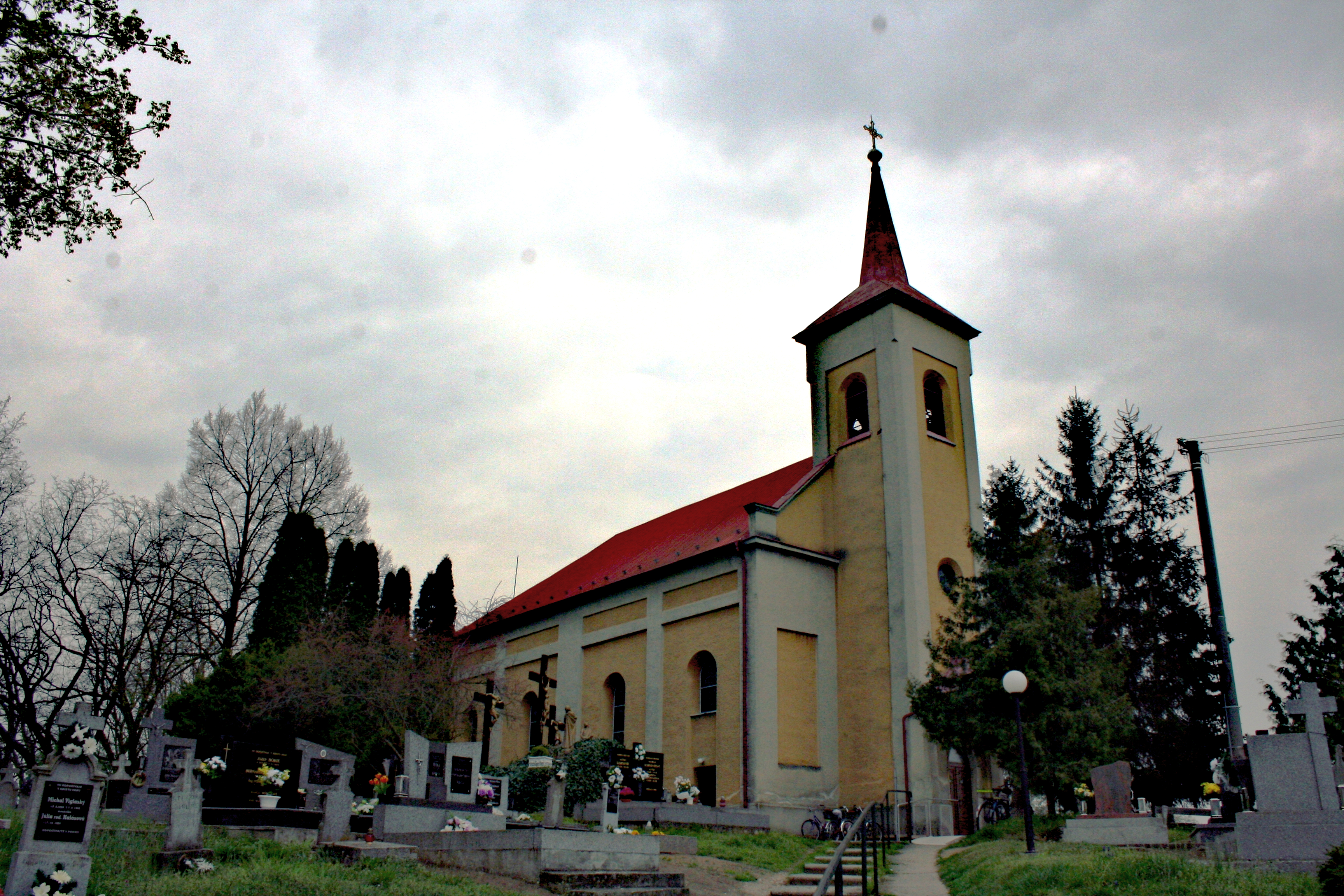 Ohaj falu